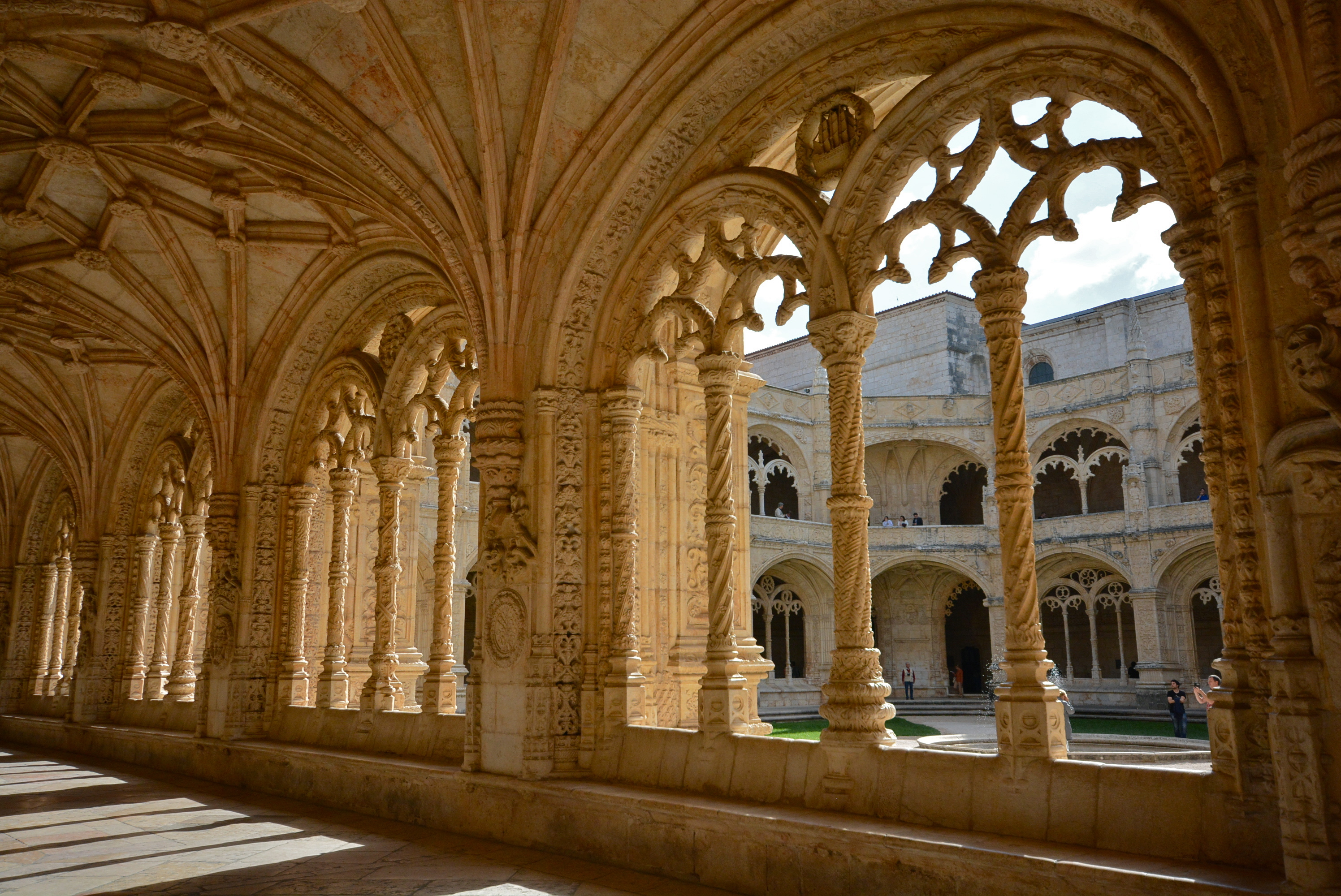 Mosterio dos Jerónimos